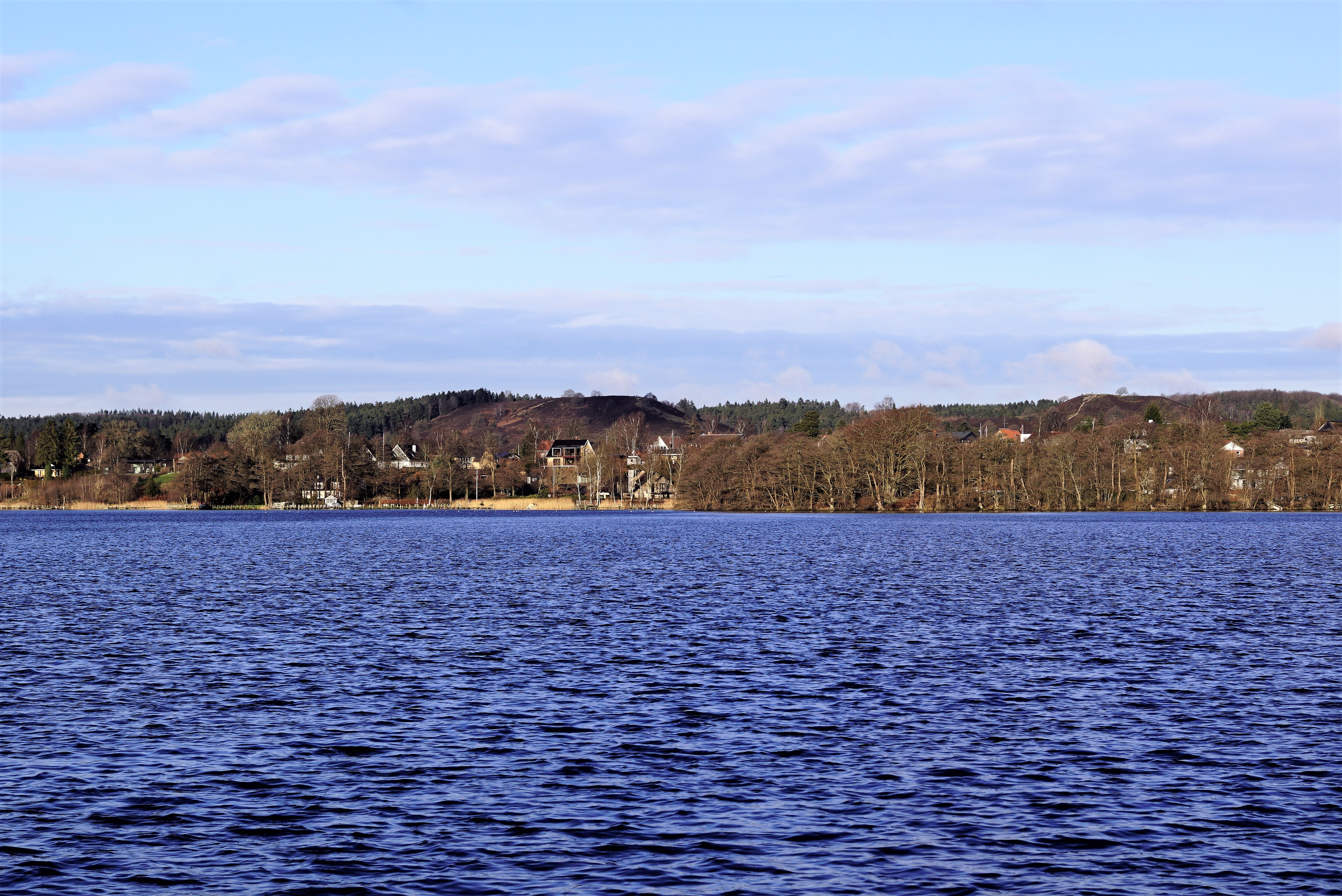 Borresø set mod Sejs med Sindbjerg og Staubjerg i baggrunden. Set fra rutebådsbroen ved Slåensø